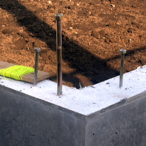 アンカーボルト_木造_01